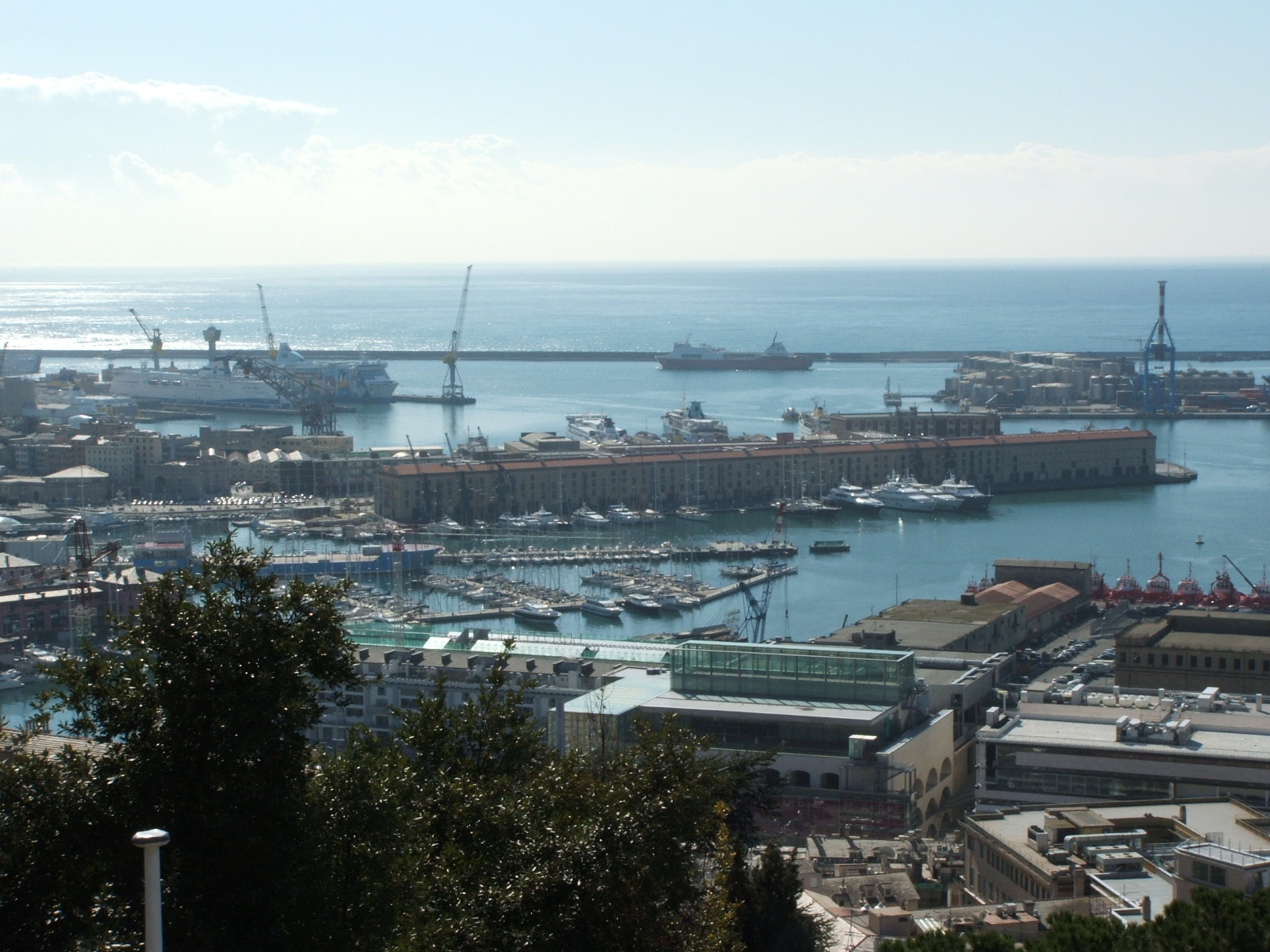 Panorama di Genova dal Castello d'Albertis